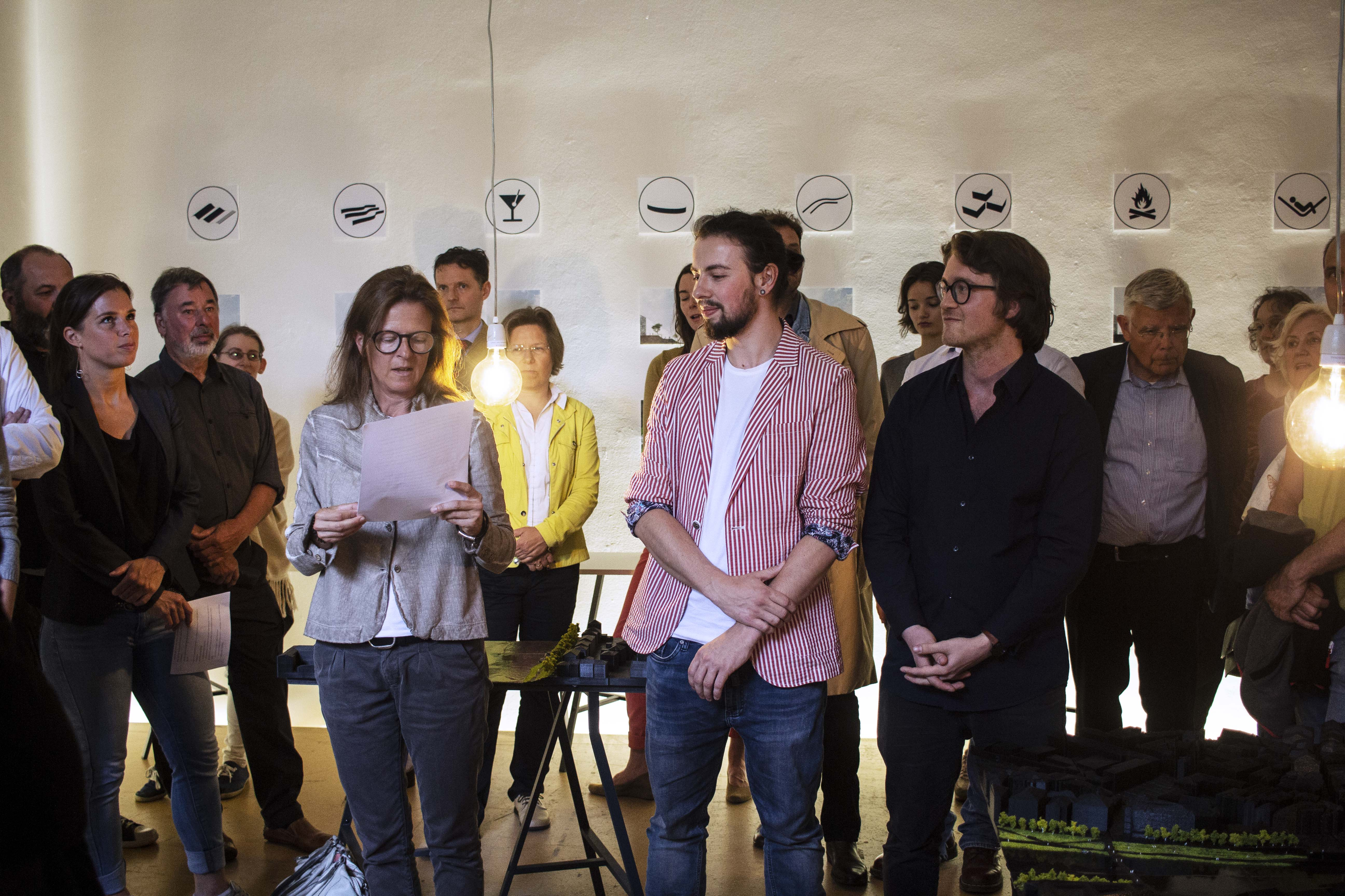 Ausstellungseröffnung "Flussraum Salzach - Transformation zur Lebensader" in der Initiative Architektur im Salzburger Künstlerhaus am 24. Mai 2018. Im Bild: Gudrun Fleischmann (Initiative Architektur), Lukas Ployer und Horst Lechner (Projektautoren)